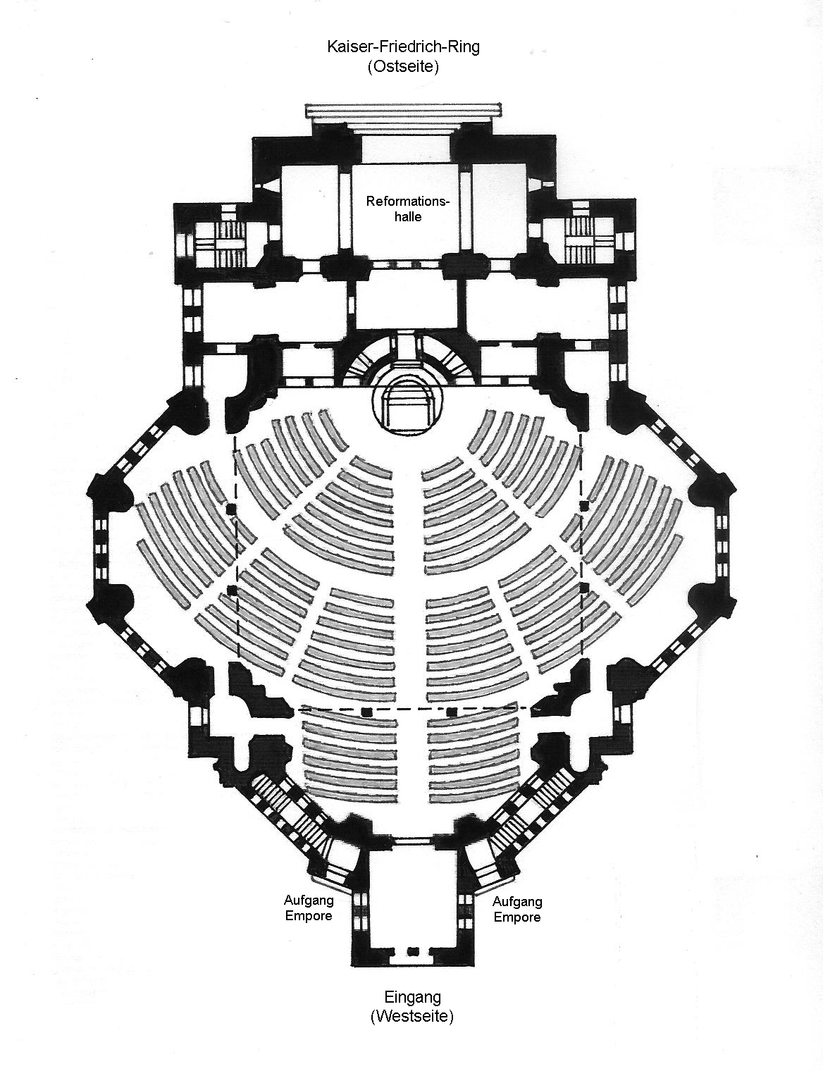 Die Zeichnung zeigt den Grundriss der 1890 bis 1894 von Johannes Otzen erbauten Ringkirche in Wiesbaden. Sie war der Prototyp des von Otzen und dem Wiesbadener Pfarrer Emil Veesenmeyer entwickelten Wiesbadener Programms und damit Vorbild für viele protestantische Kirchenbauten in Deutschland bis zum Ersten Weltkrieg. Der Grundriss zeigt einen Zentralbau, in dem die Kirchenbänke wie in einem Amphitheater halbkreisförmig um Altar, Kanzel und Orgel angeordnet sind. Eine weitere Besonderheit ist, dass der Bau eine innere Ostung hat (der Eingang befindet sich im Westen), von Außen aber nach Westen ausgerichtet zu sein scheint.